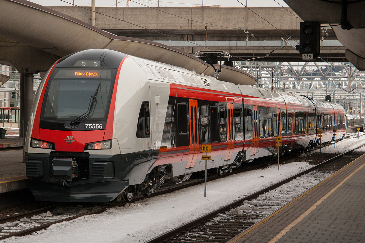 Tog på linje R30x til Gjøvik forlater Oslo sentralstasjon.